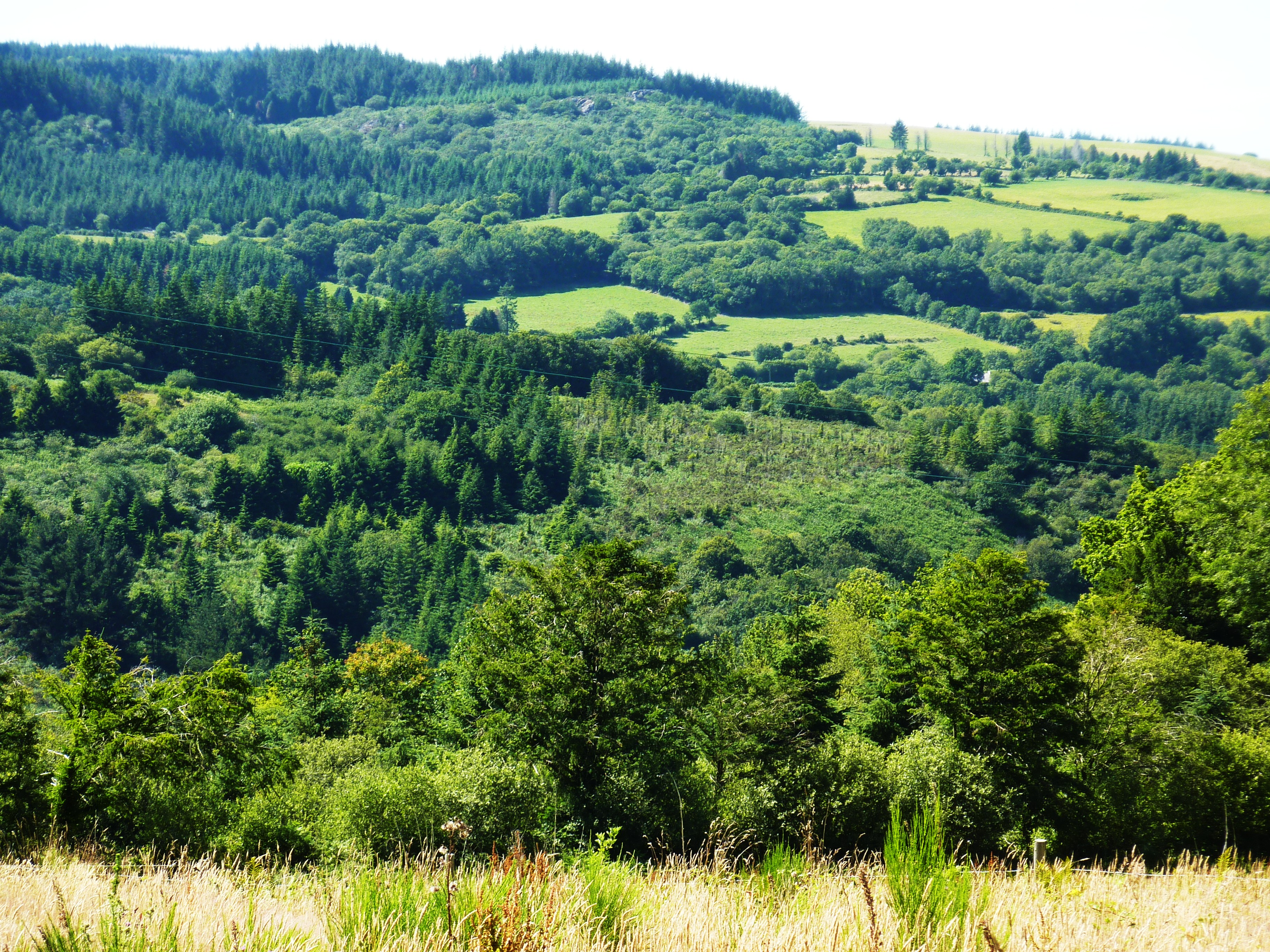 Saint-Rivoal: paysage vallonné, verdoyant et bocager vu de Goas-al-Ludu